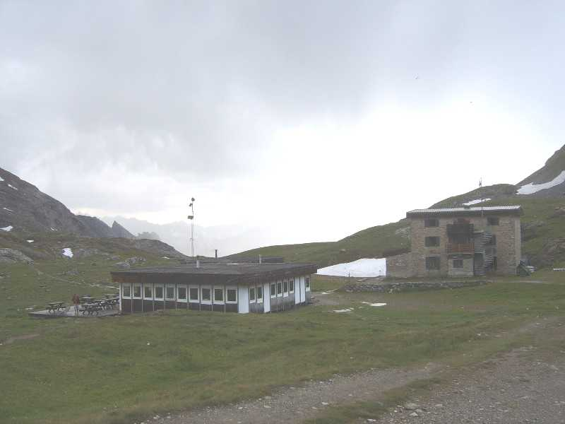 Refuge du Col de la Vanoise, Pralognan-la-Vanoise. Personal picture, I set it in public domain.